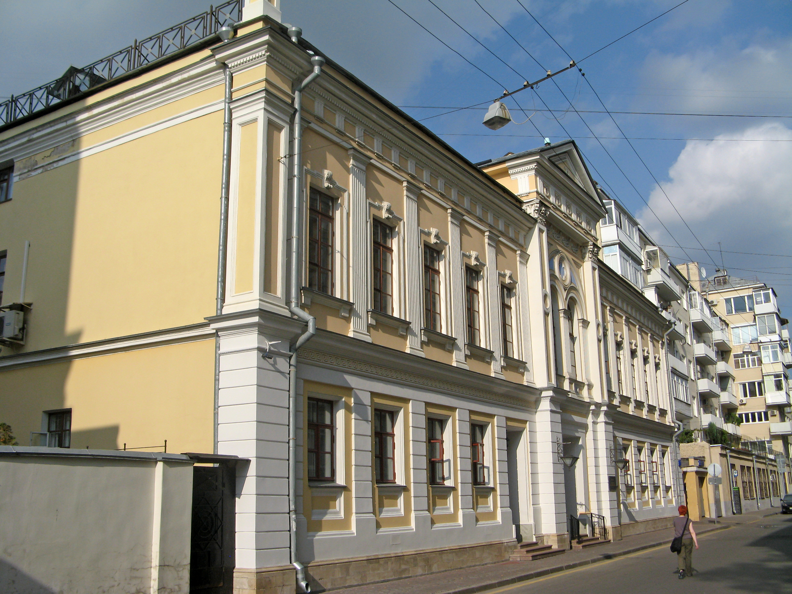 Евангелическо-реформатская церковь (с 1917 г. – Молитвенный дом Евангельских христиан-баптистов): Трехсвятительский Б. пер., дом 4, Трехсвятительский М. пер., дом 3, Басманный, Центральный округ, Москва